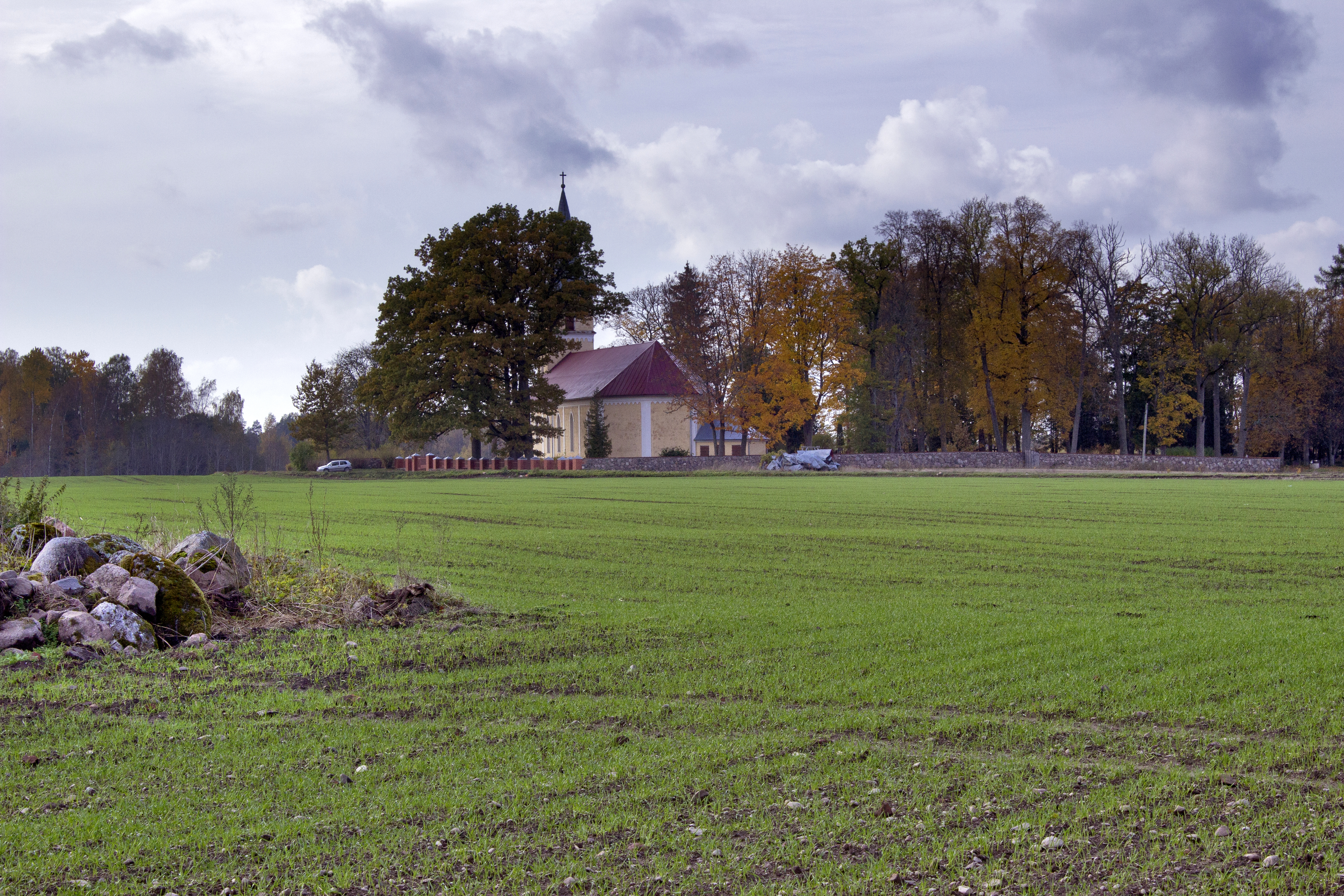 Ārlava